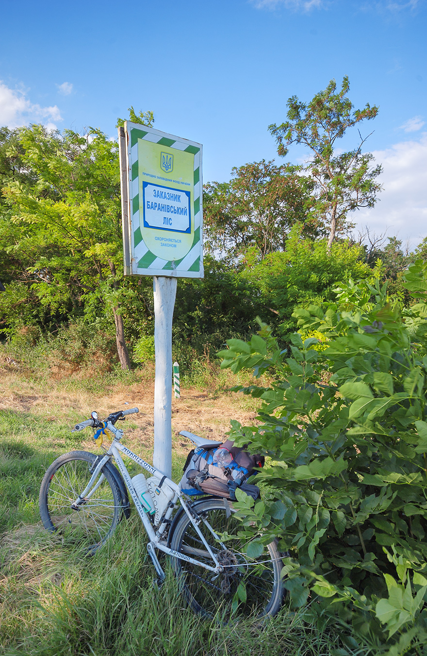 «Баранівський ліс», м. Ізмаїл, Ізмаїльське лісництво, кв. 13-17, ур. «Баранівка»